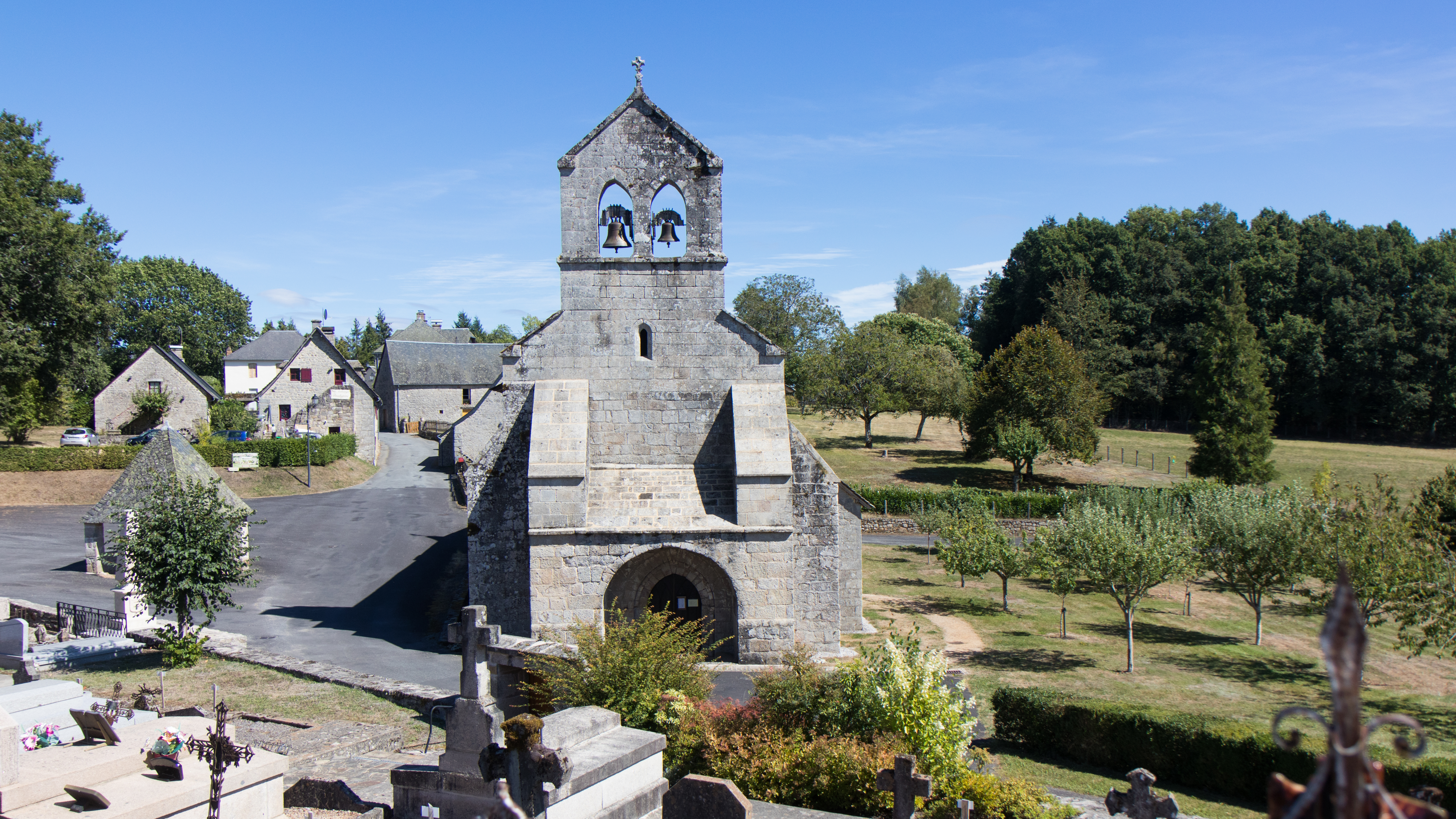 Église Saint-Maurice de Darnets .